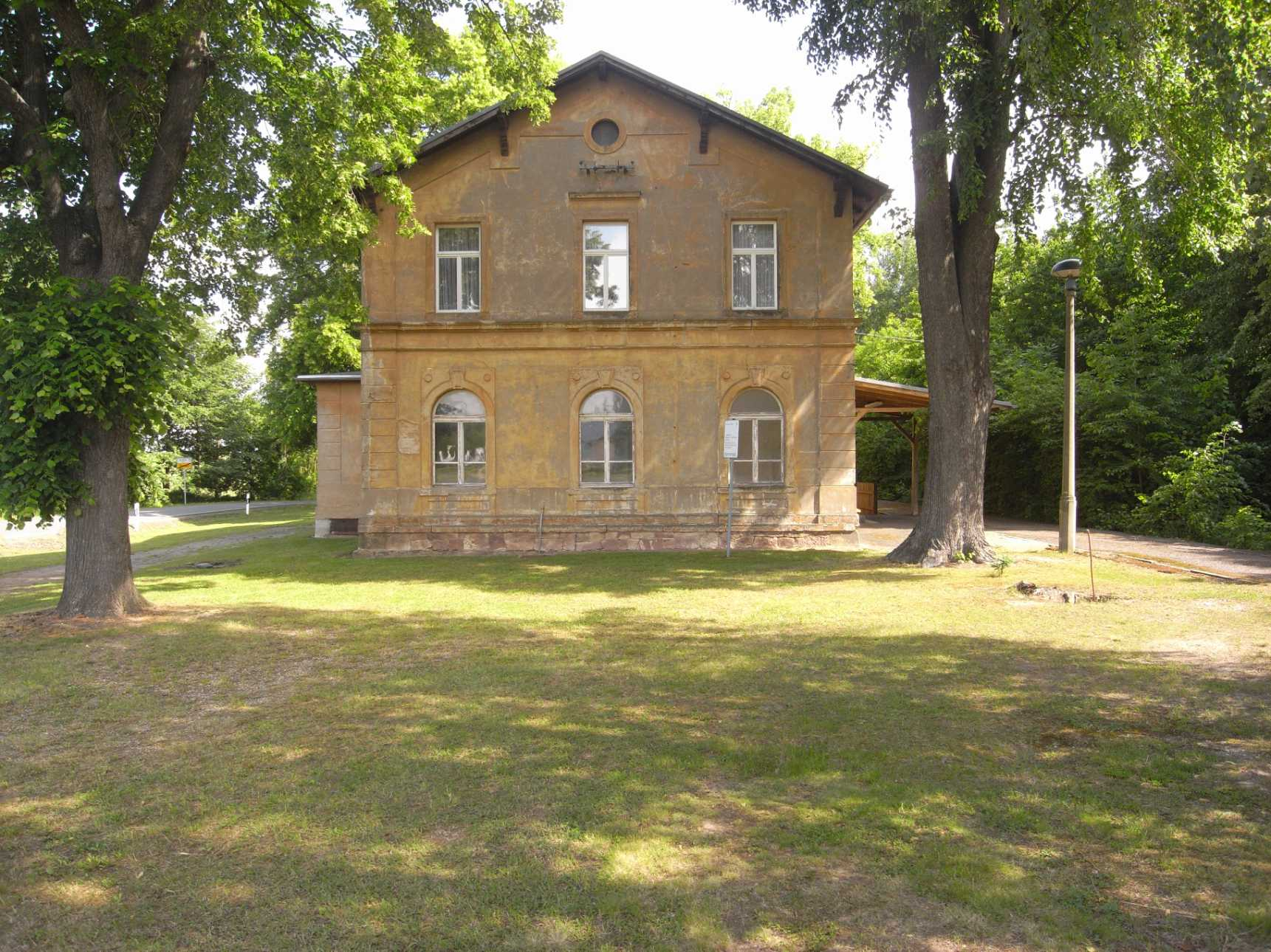 ehemaliger Bahnhof in Starbach (Deutschland, Sachsen)